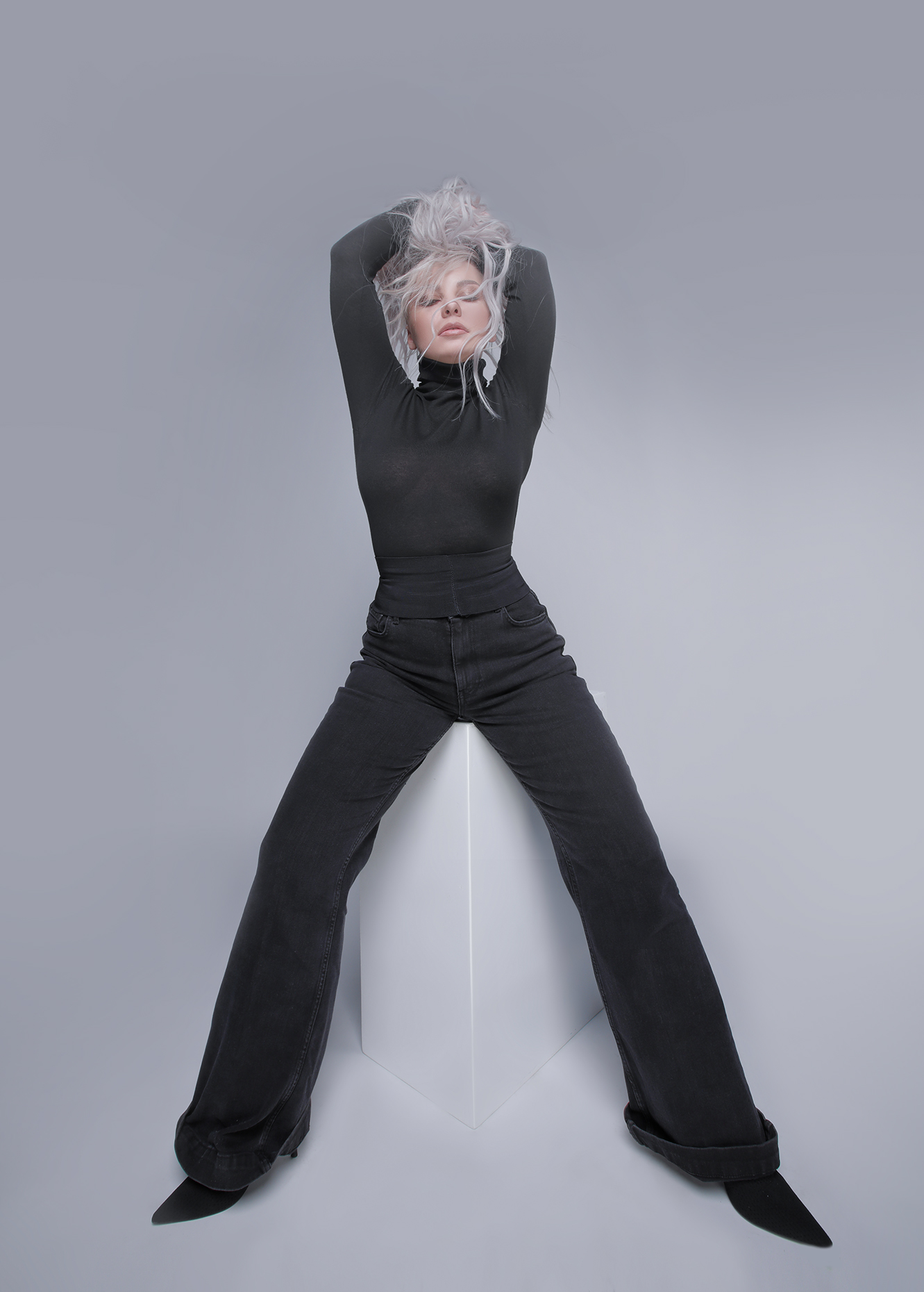 представлення нового образу, я результат співпраці з M1 Agency